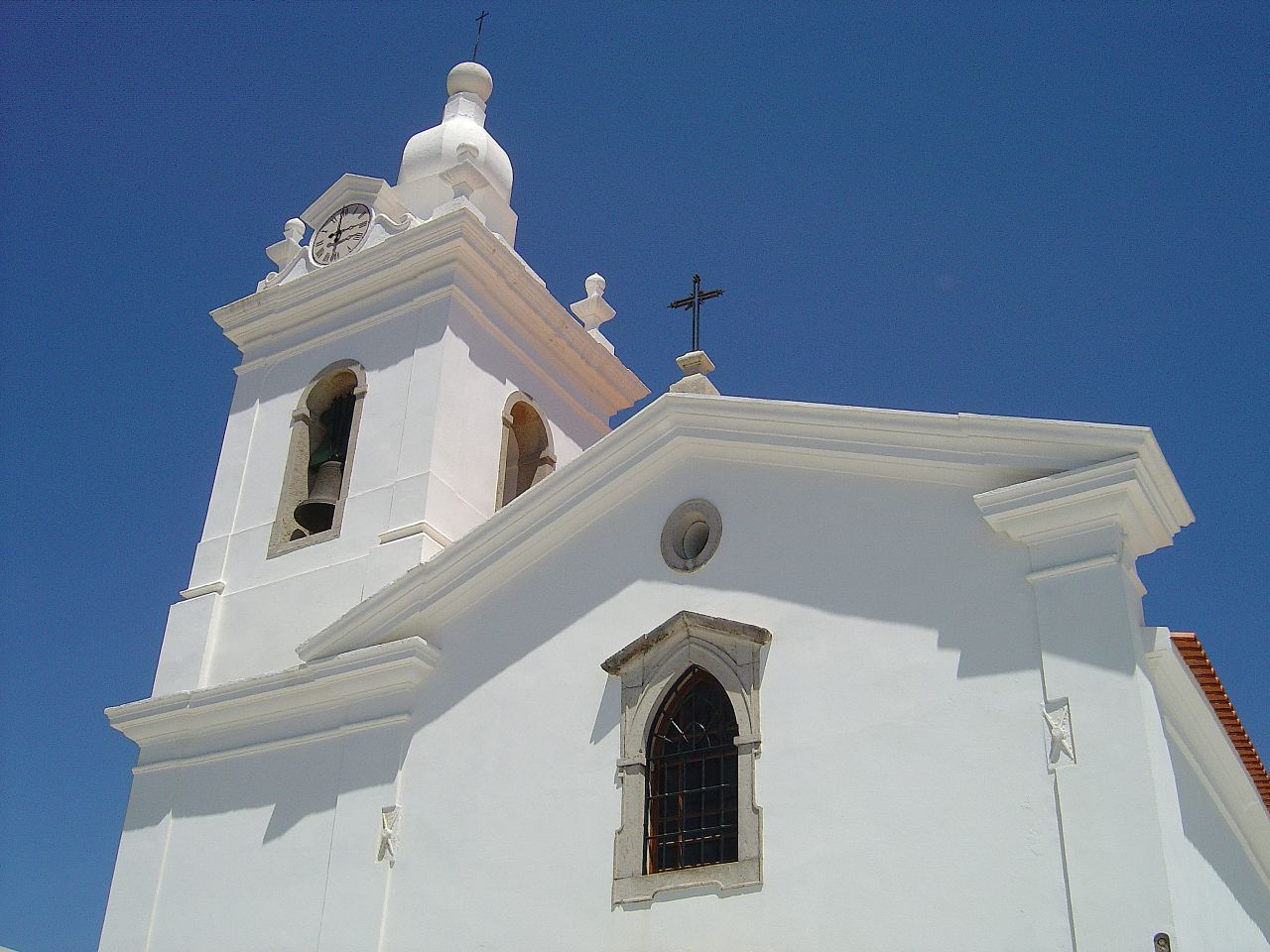 Igreja Matriz do Cadaval - Portugal